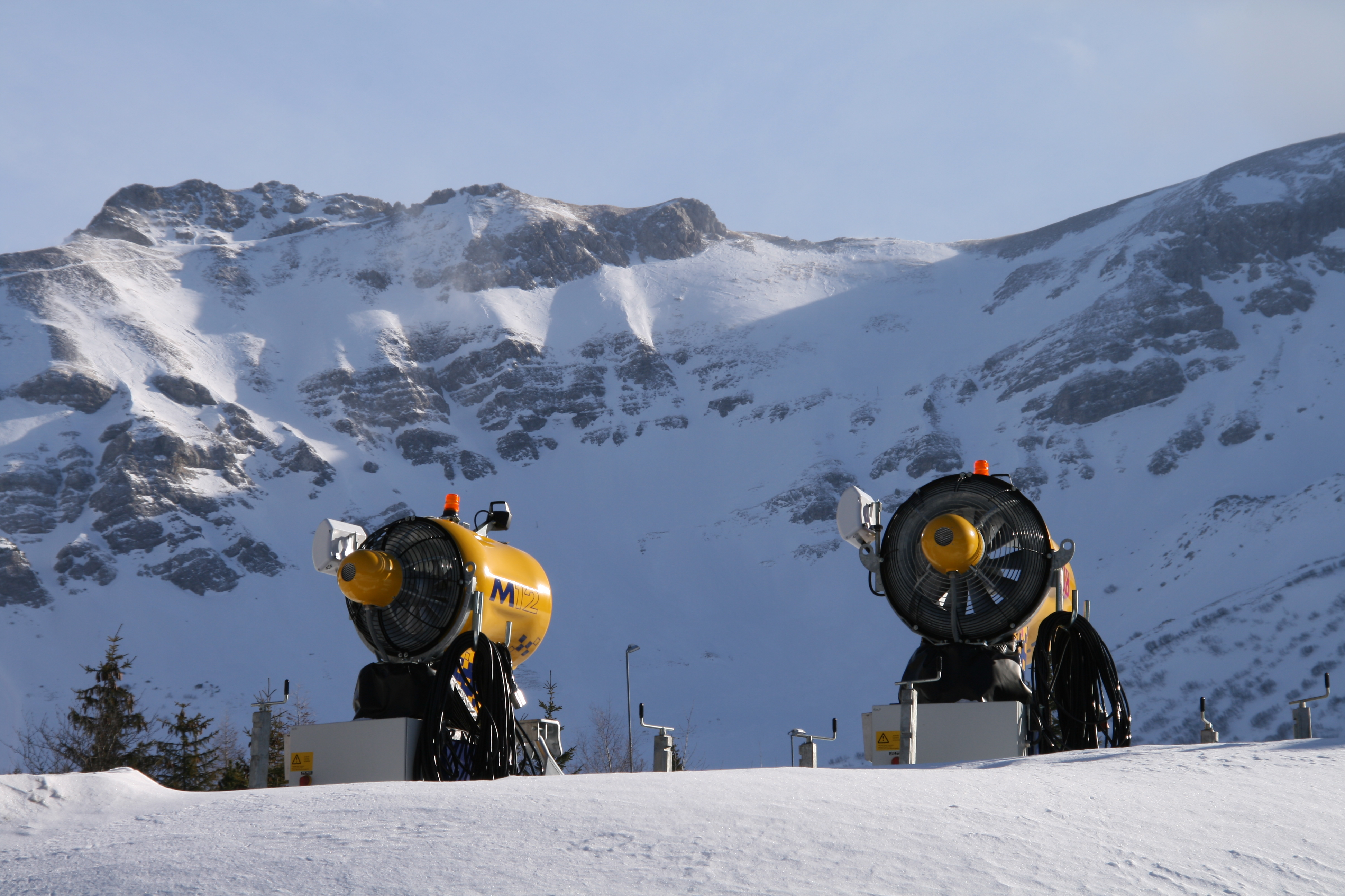 Winter in Malbun. Schneekanonen M12 der TechnoAlpin.